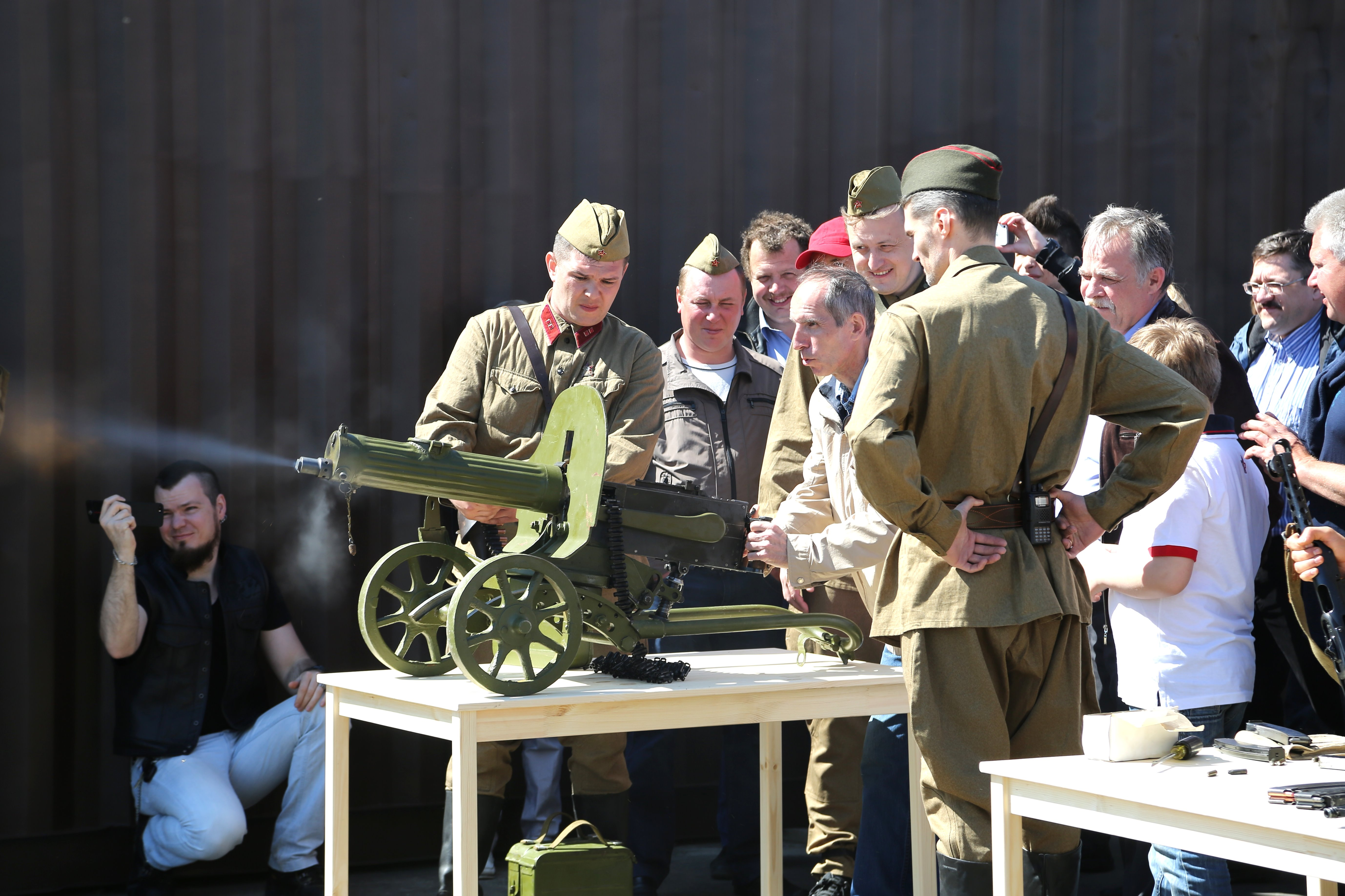 Интерактивная программа праздника в Музее отечественной истории